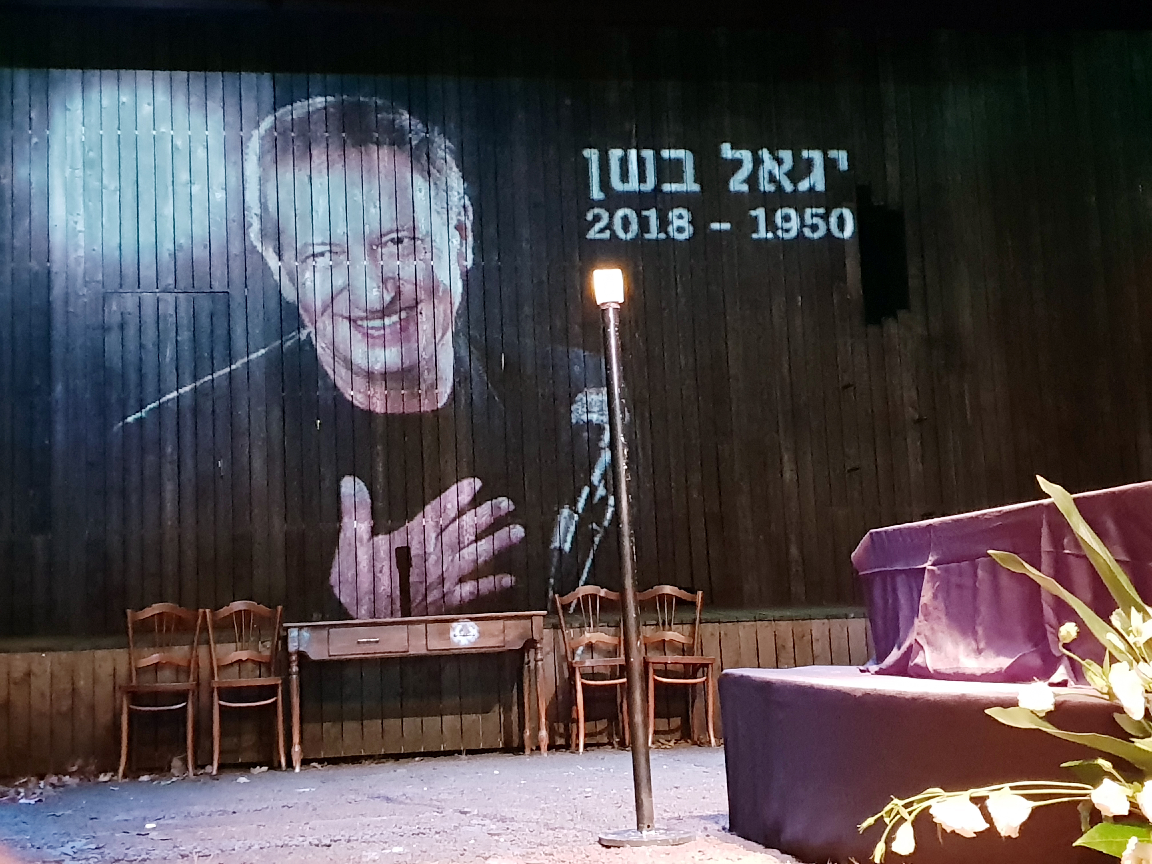 ארונו של יגאל בשן על בימת תאטרון הבימה על רקע כרזת הפרידה בטקס ההספדים